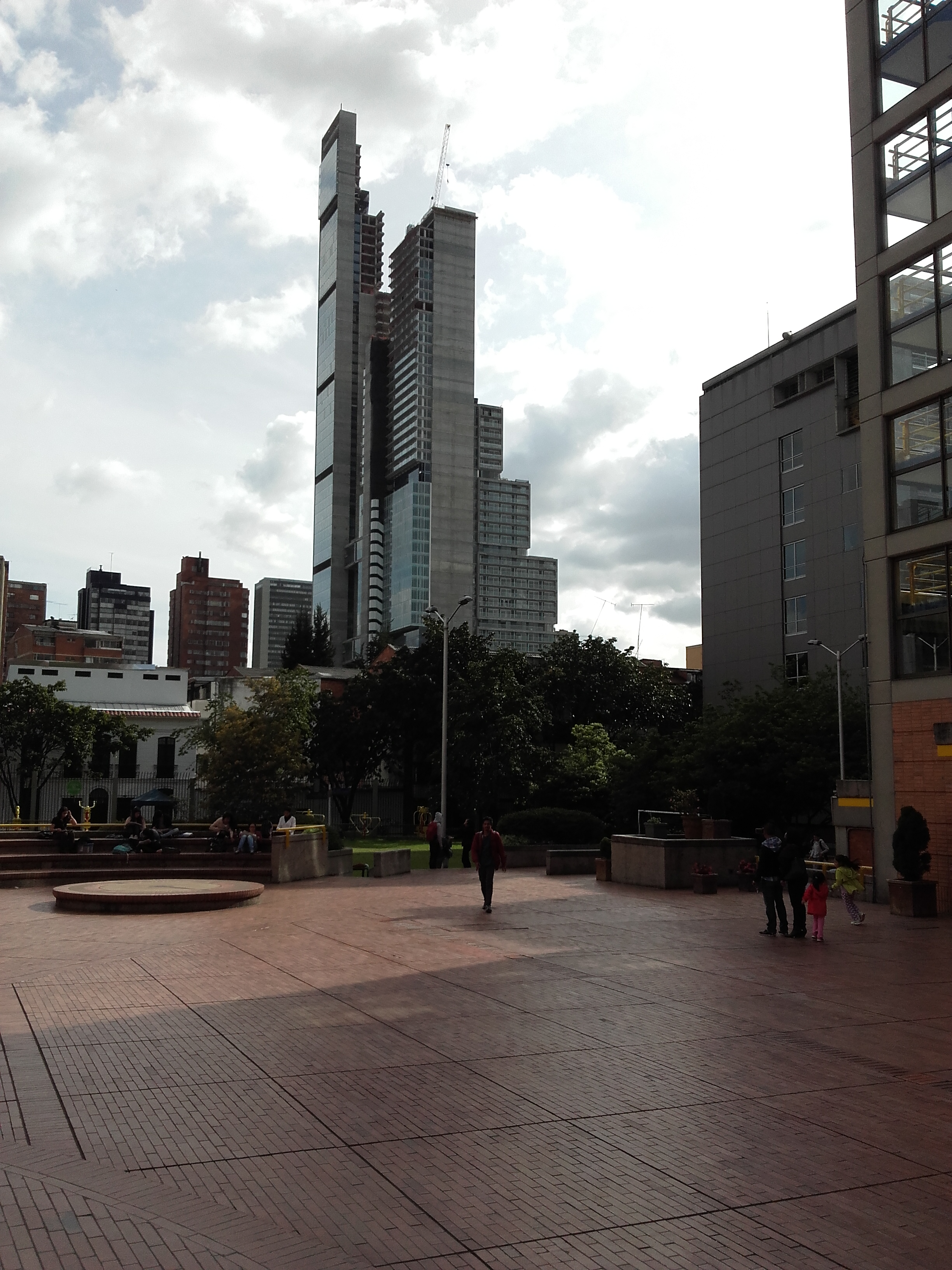 fkdkdkdkfkfkf